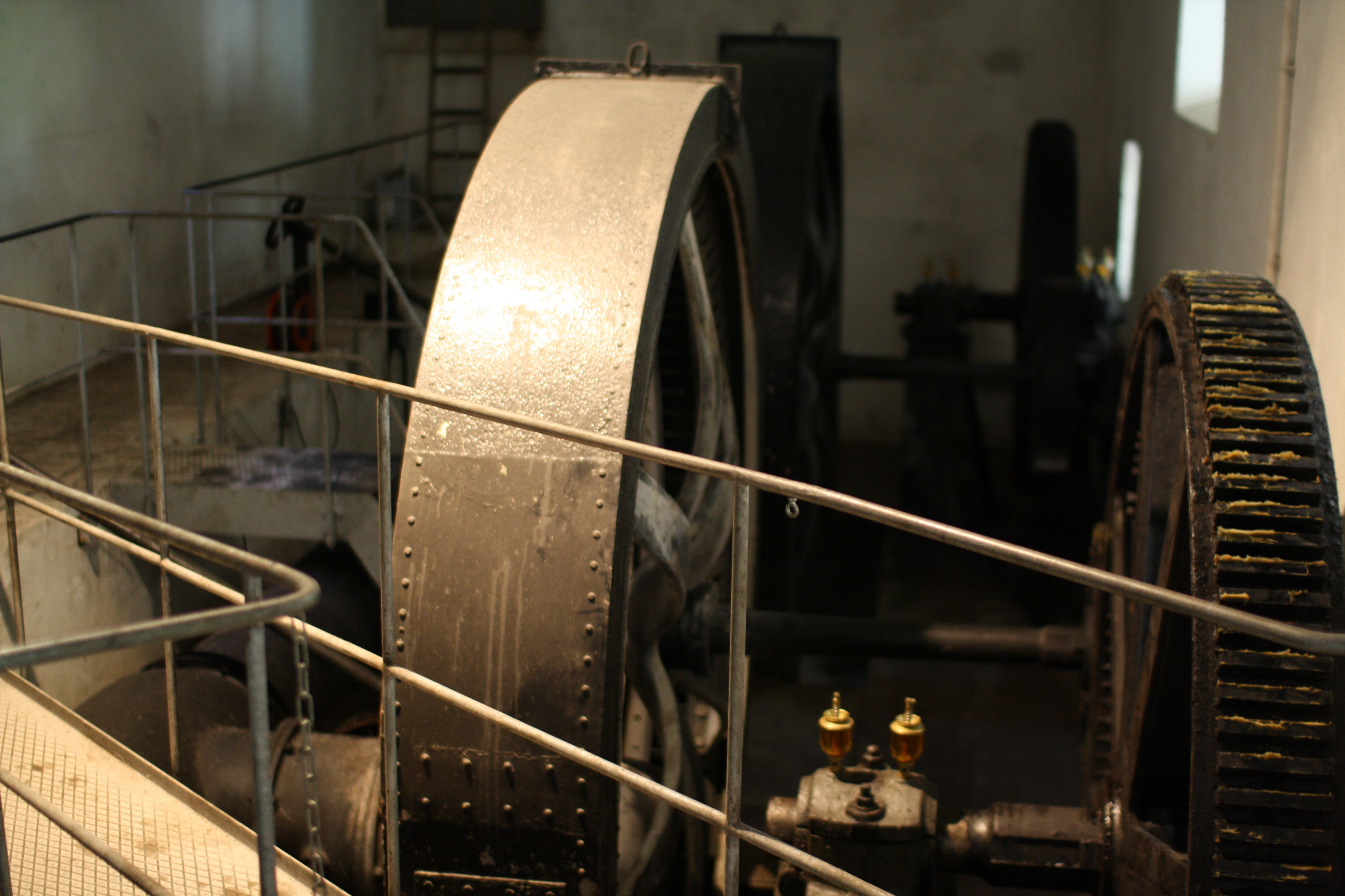 Turbine (li.) und Getriebe (re.) des Hofbrunnwerks, München